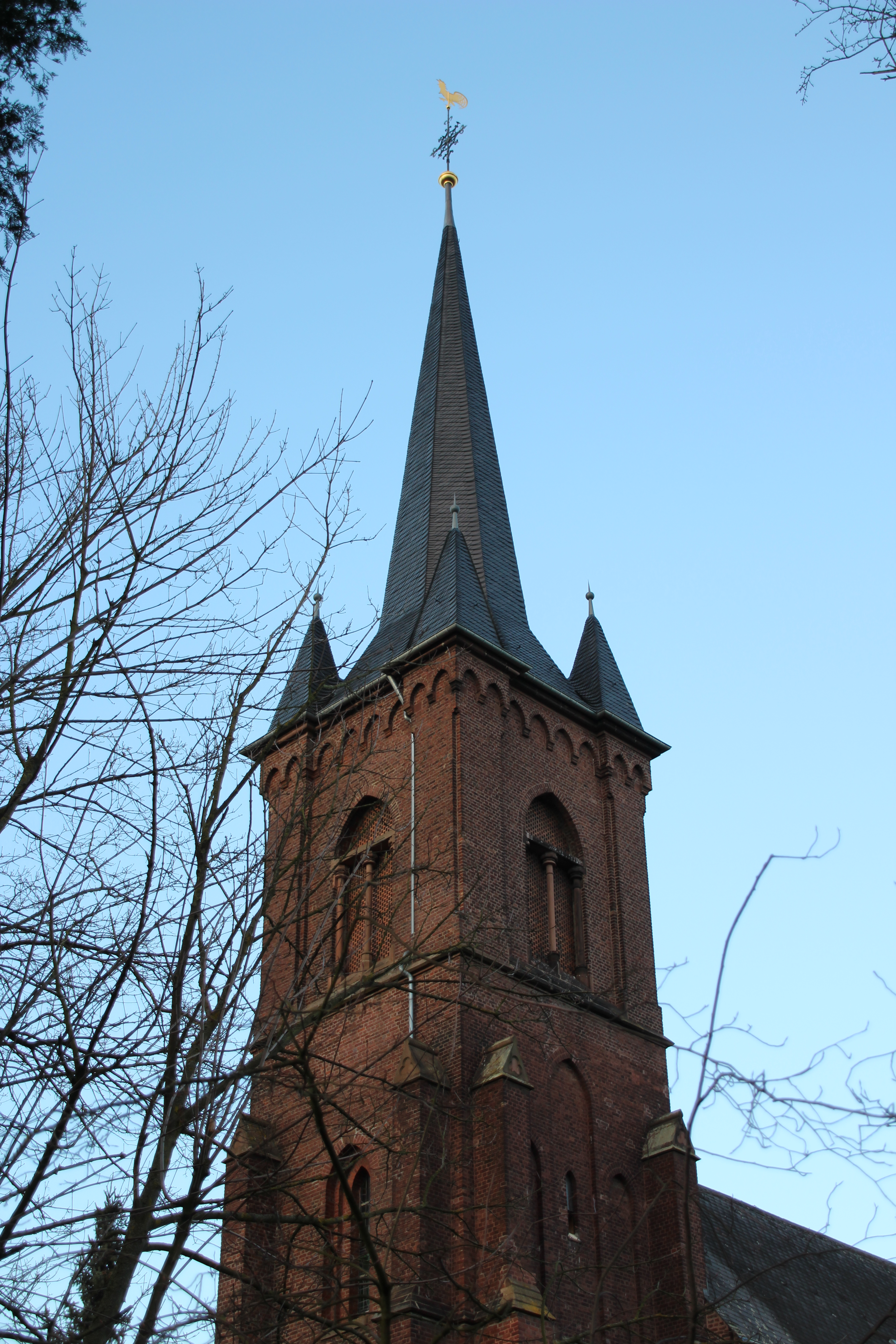 Kirchturm der Kath. Pfarrkirche St. Thomas von Canterbury in Niederzier-Ellen.